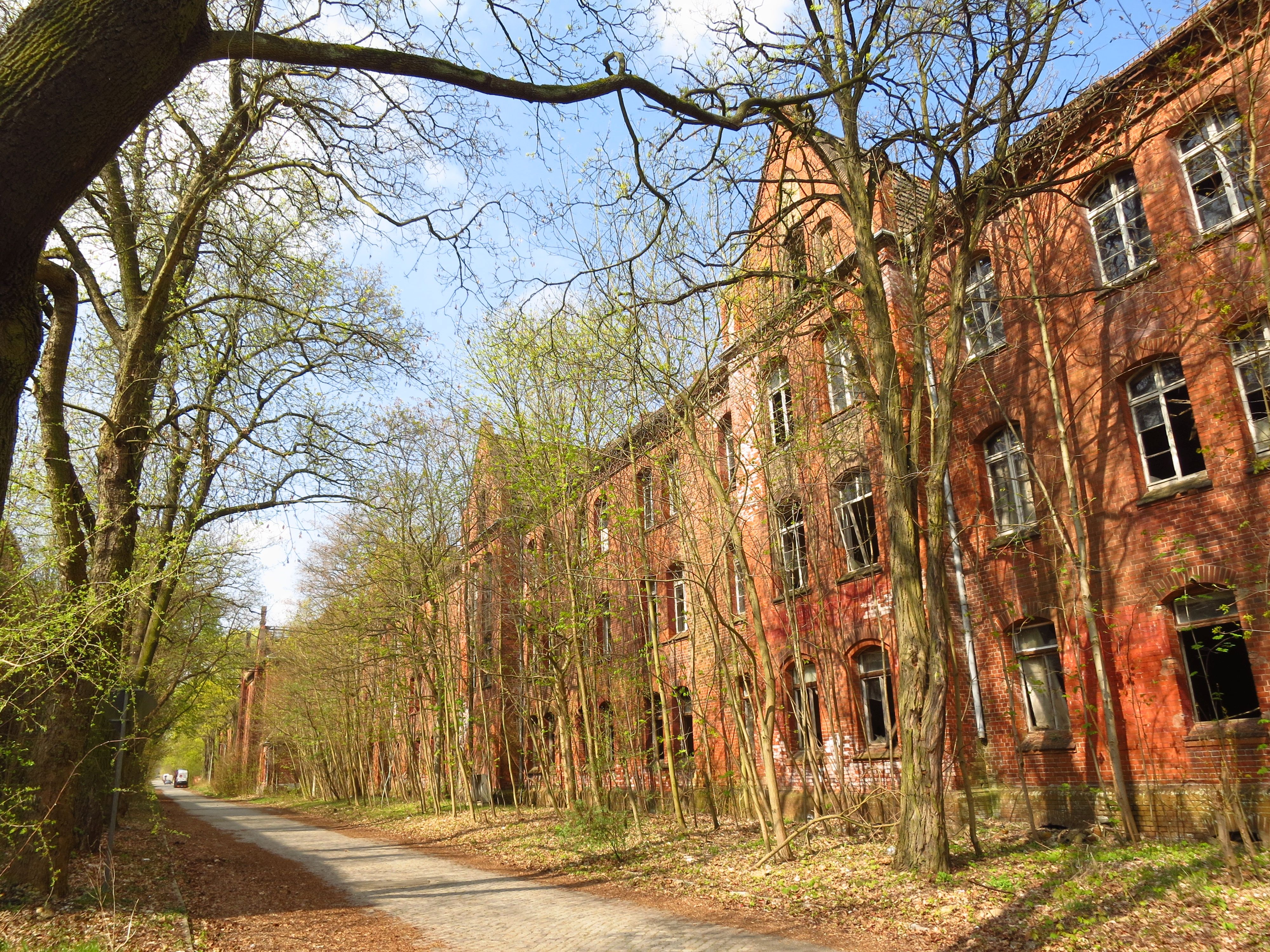 Jüterbog, Kasernengelände der Artellierie-Schießschule, Tauentzienstraße